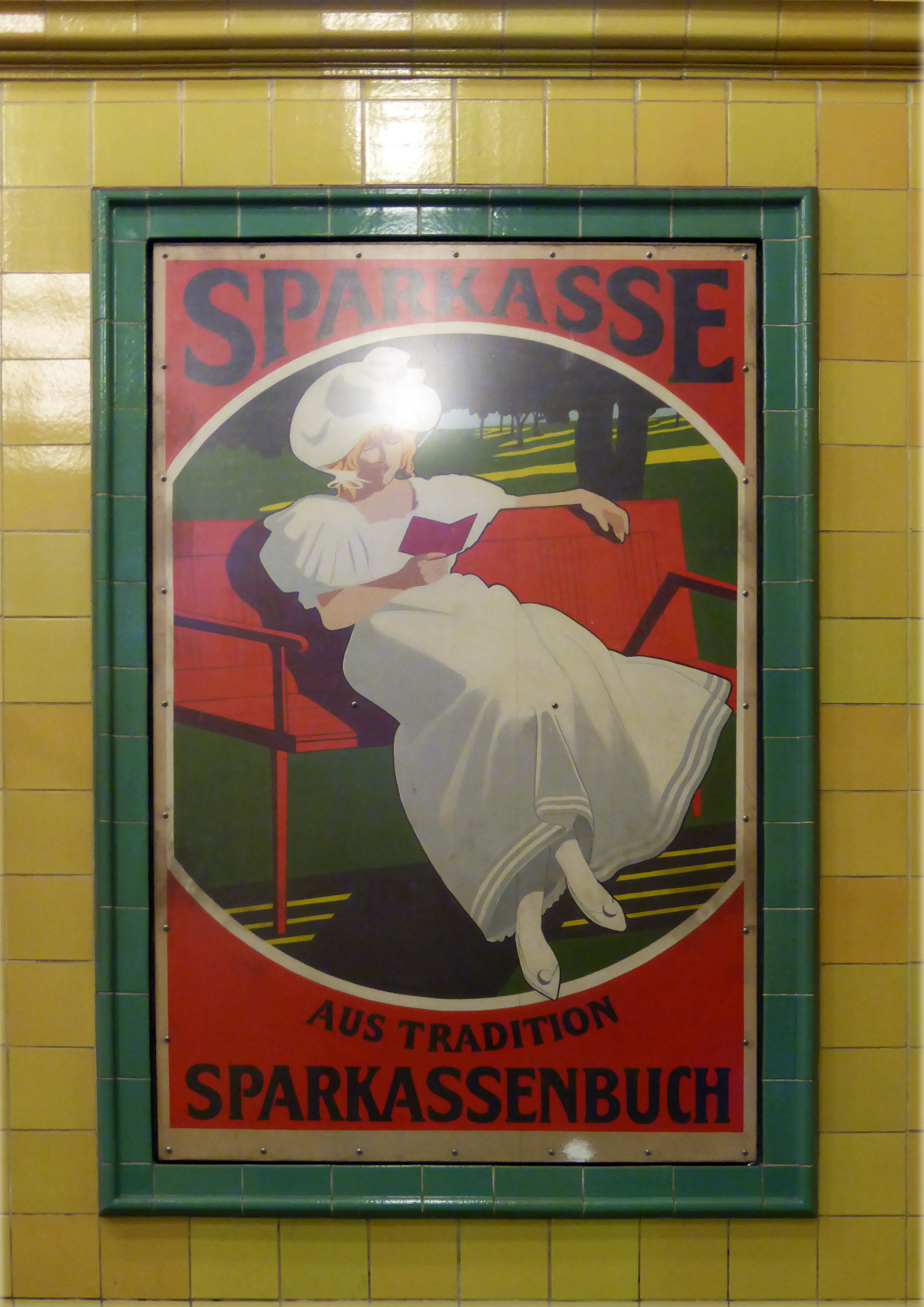 Werbefläche (Berliner Sparkasse) im U-Bahnhof Wittenbergplatz, Berlin.